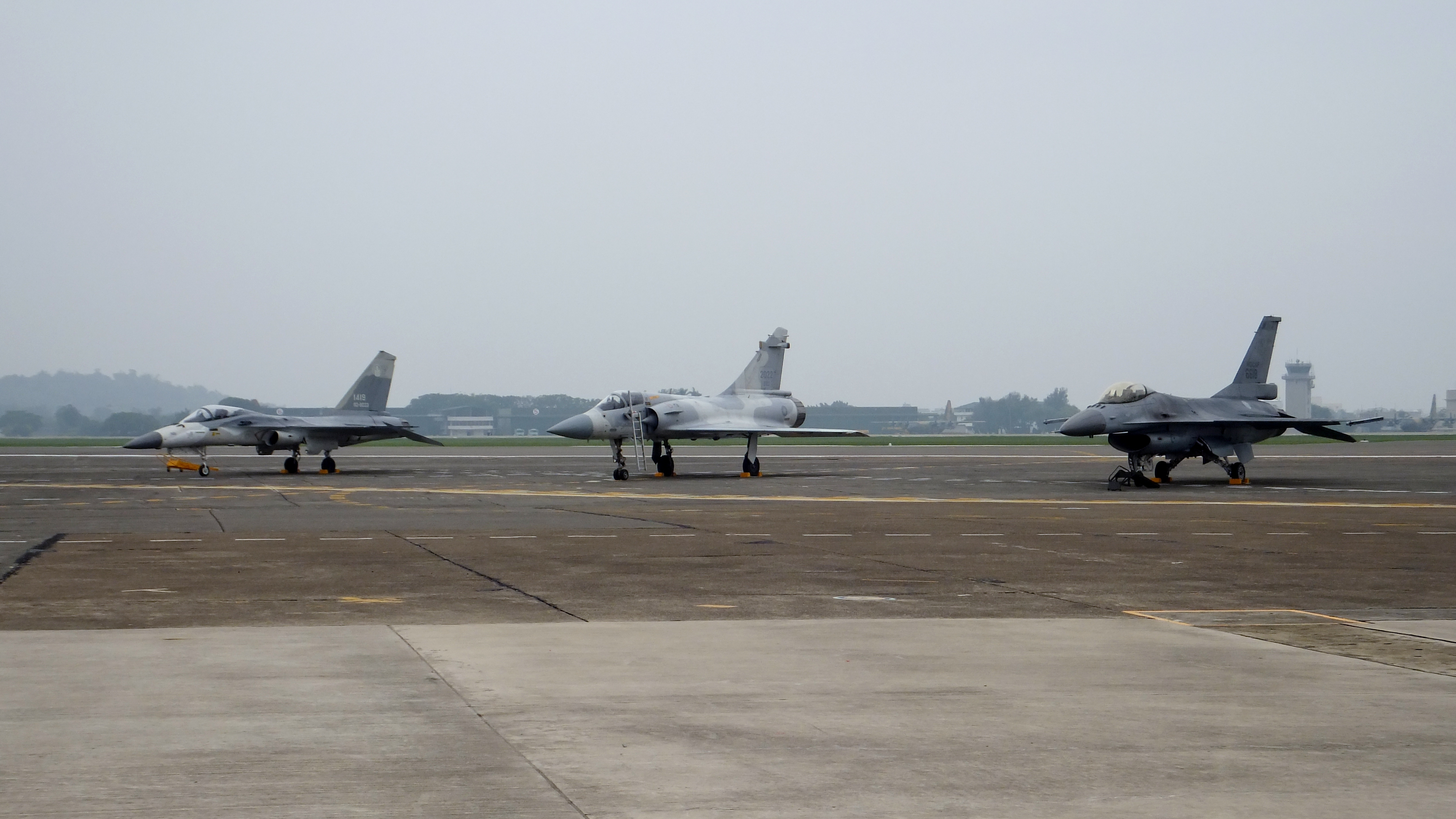 2011年岡山空軍基地營區開放活動中，並列於停機坪的中華民國空軍三大主力戰鬥機：IDF經國號、幻象2000與F-16。